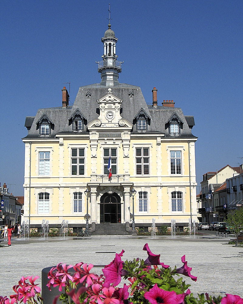 Hôtel de Ville de Commentry